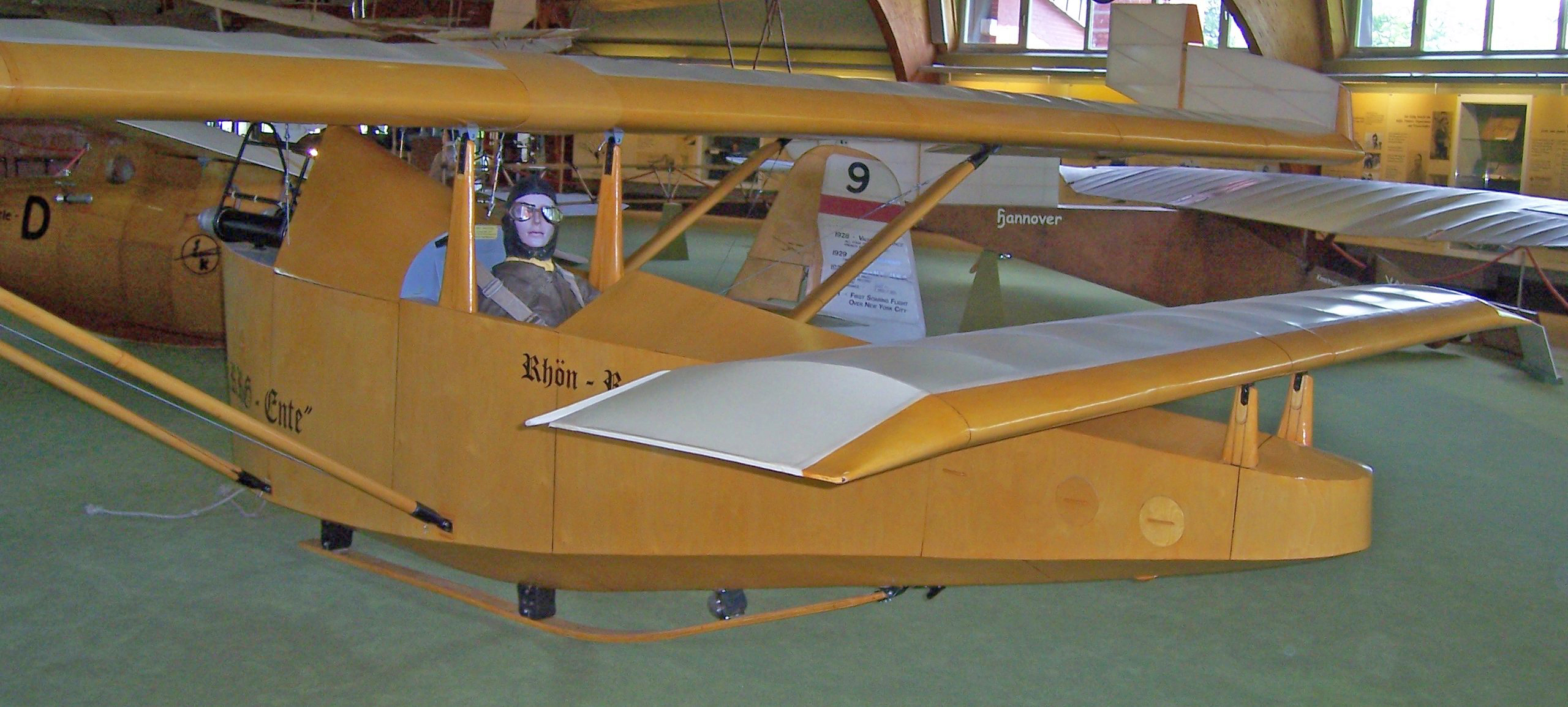 RRG Raketen-Ente: Frontansicht